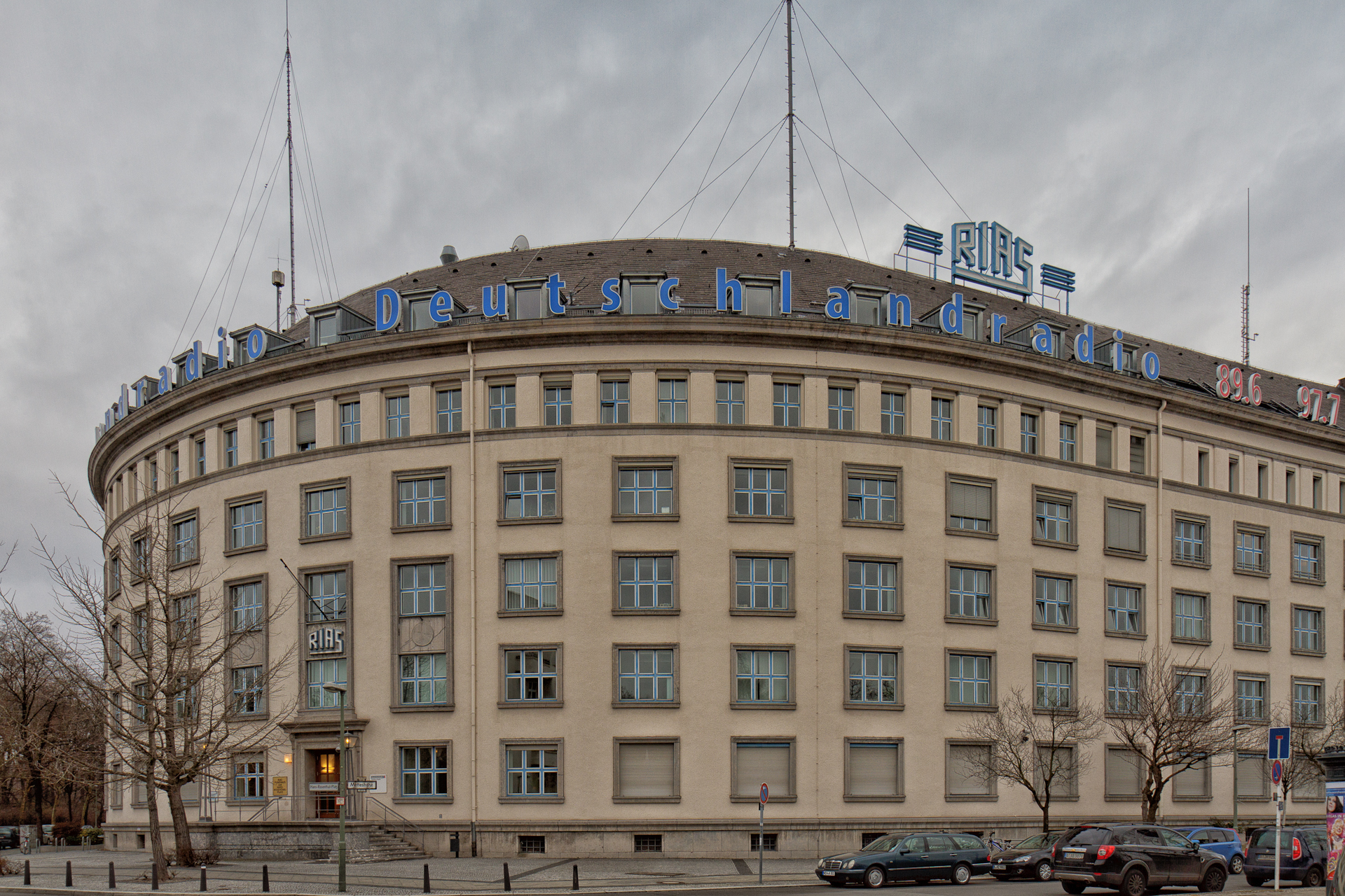 Gebäude des RIAS und von Deutschlandradio Kultur in Berlin-Schöneberg 2012